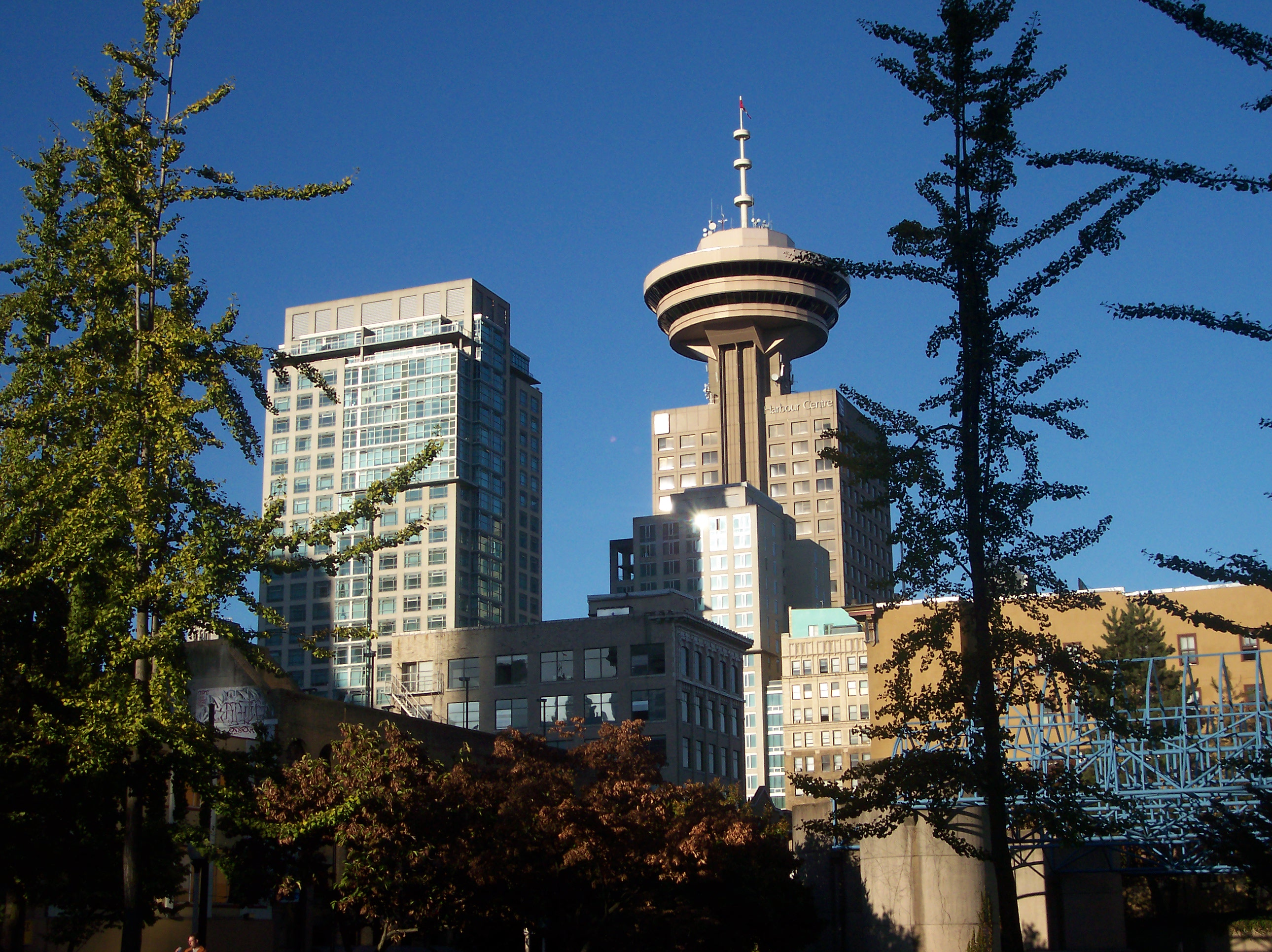 Harbour Centre, Vancouver, BC, Canada